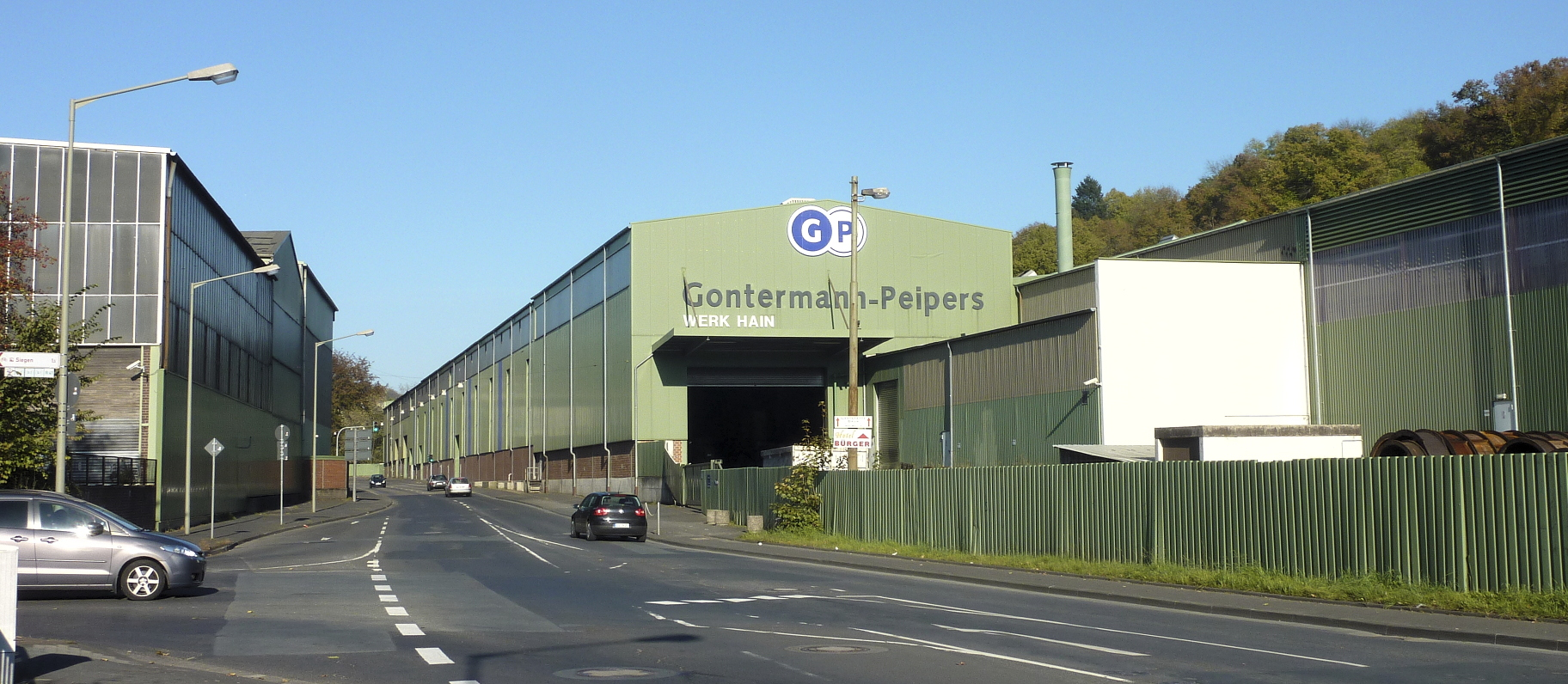 Gontermann-Peipers (GP) ist ein deutsches Unternehmen der metallverarbeitenden Industrie. Die Firma ist Hersteller von Walzwerkswalzen und Gussprodukten und hat ihren Sitz in der nordrhein-westfälischen Stadt Siegen. Das Foto zeigt eine Außenansicht von Werkshallen des Werks Hain im Siegener Stadtteil Hain an der Marienborner Straße, Blick nach Nordosten. Links im Bild die Einmündung der Straße Hainer Hütte